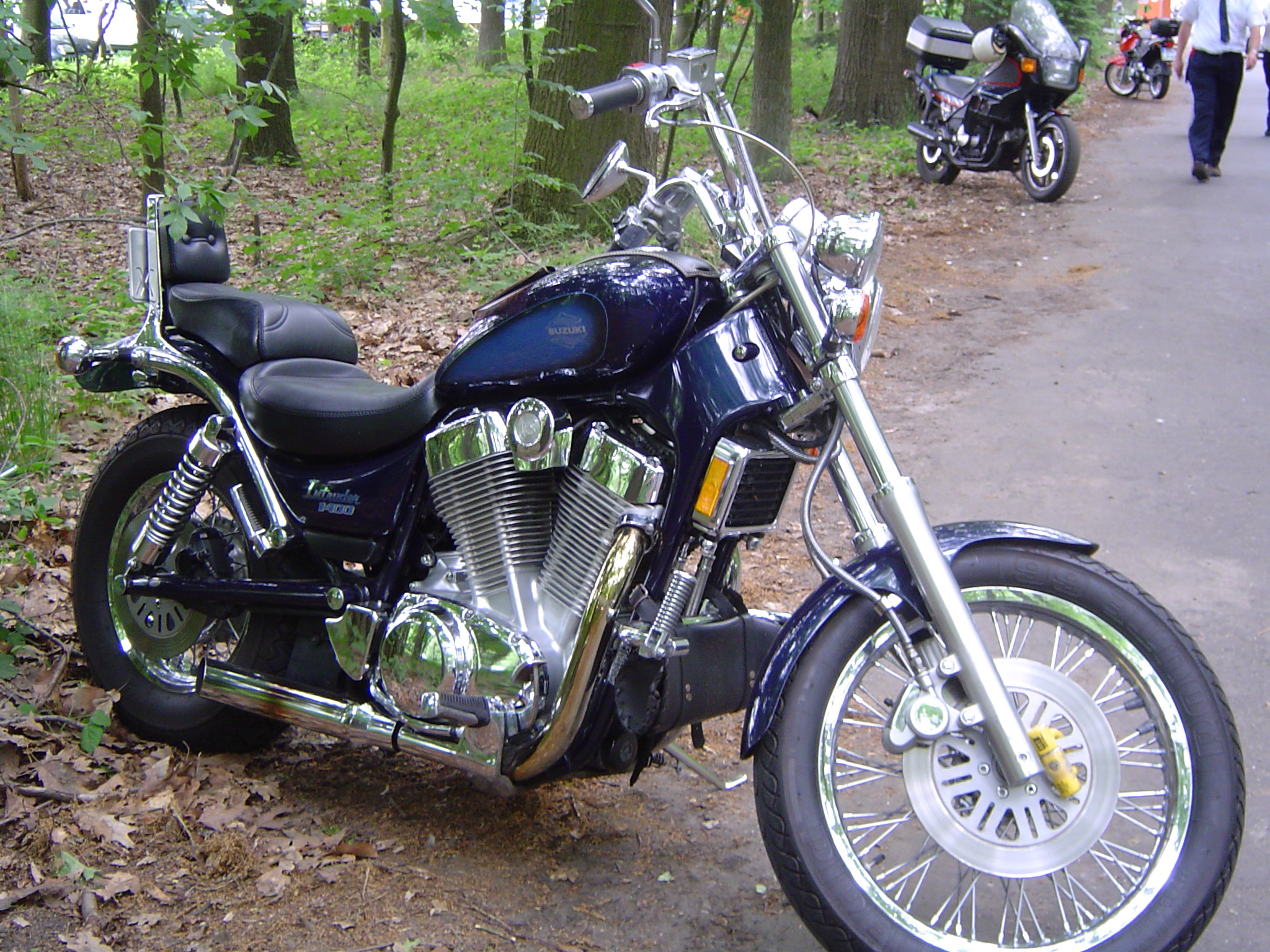 Toestemming van Motorsportvereniging Mike the Bike, Weert